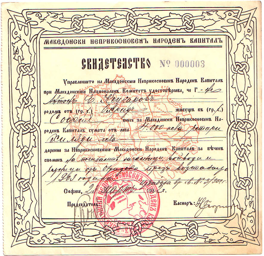 Документ за дарение на Антон Кецкаров на Македонския национален комитет.